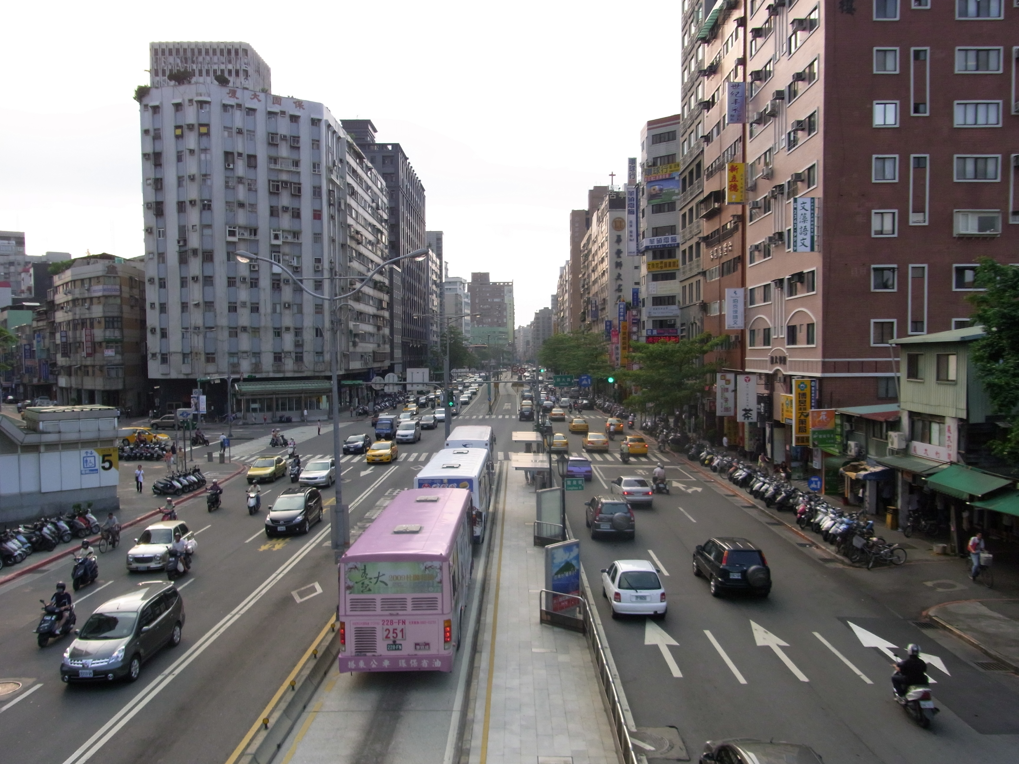 台北市羅斯福路與師大路口